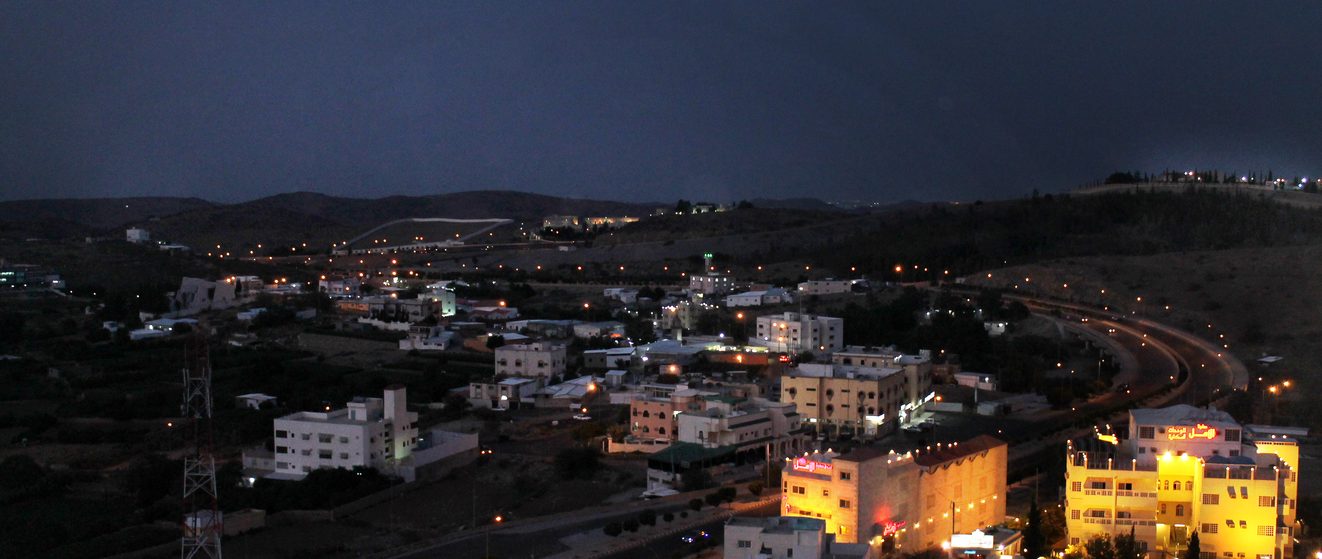 إطلالة على مدينة الطائف من جبل الهدى.